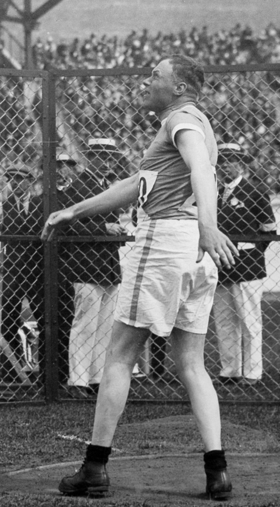 Sport. Sport, Olympische Spelen Amsterdam, 1928 : De Fin E.G. Eriksson tijdens het kogelslingeren.